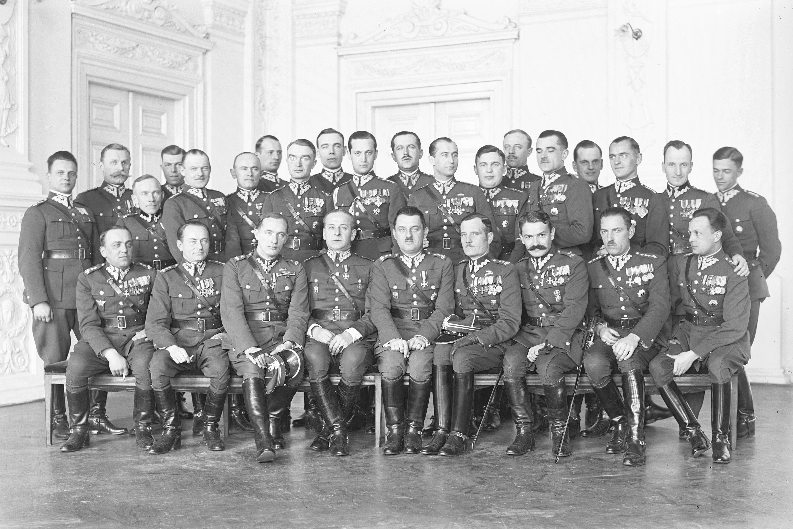 Grupa oficerów. Wśród siedzących: płk Bolesław Wieniawa-Długoszowski (4. z lewej), ppłk Jan Karcz (5. z lewej), ppłk Zygmunt Wenda (4. z prawej), rtm. Jan Motz (2. z prawej). Wśród stojących: rtm Mieczysław Badowski (2. z lewej), mjr Józef Szostak (8. z lewej), por. Józef Wilczyński (9. z lewej), rtm. Franciszek Flatau (10. z lewej), por. Kazimierz Pereświet-Sołtan (4. z prawej).